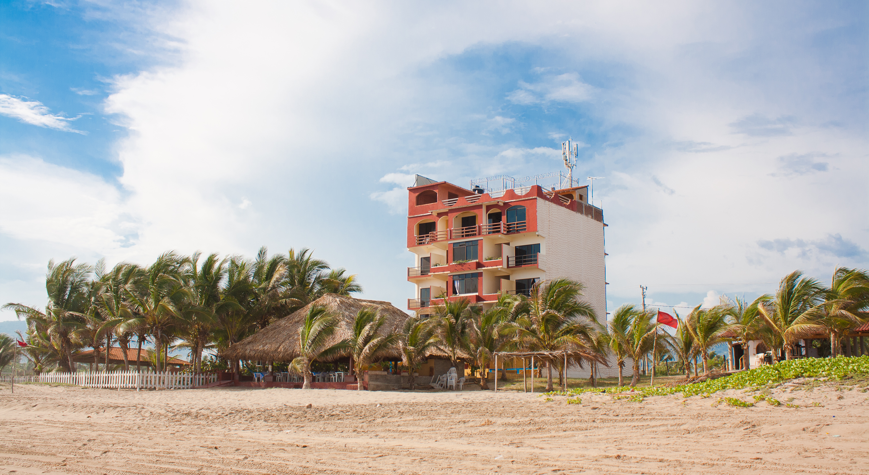 Fachada del hotel frente al mar, se aprecia que es un lugar tranquilo y muy poco frecuentado